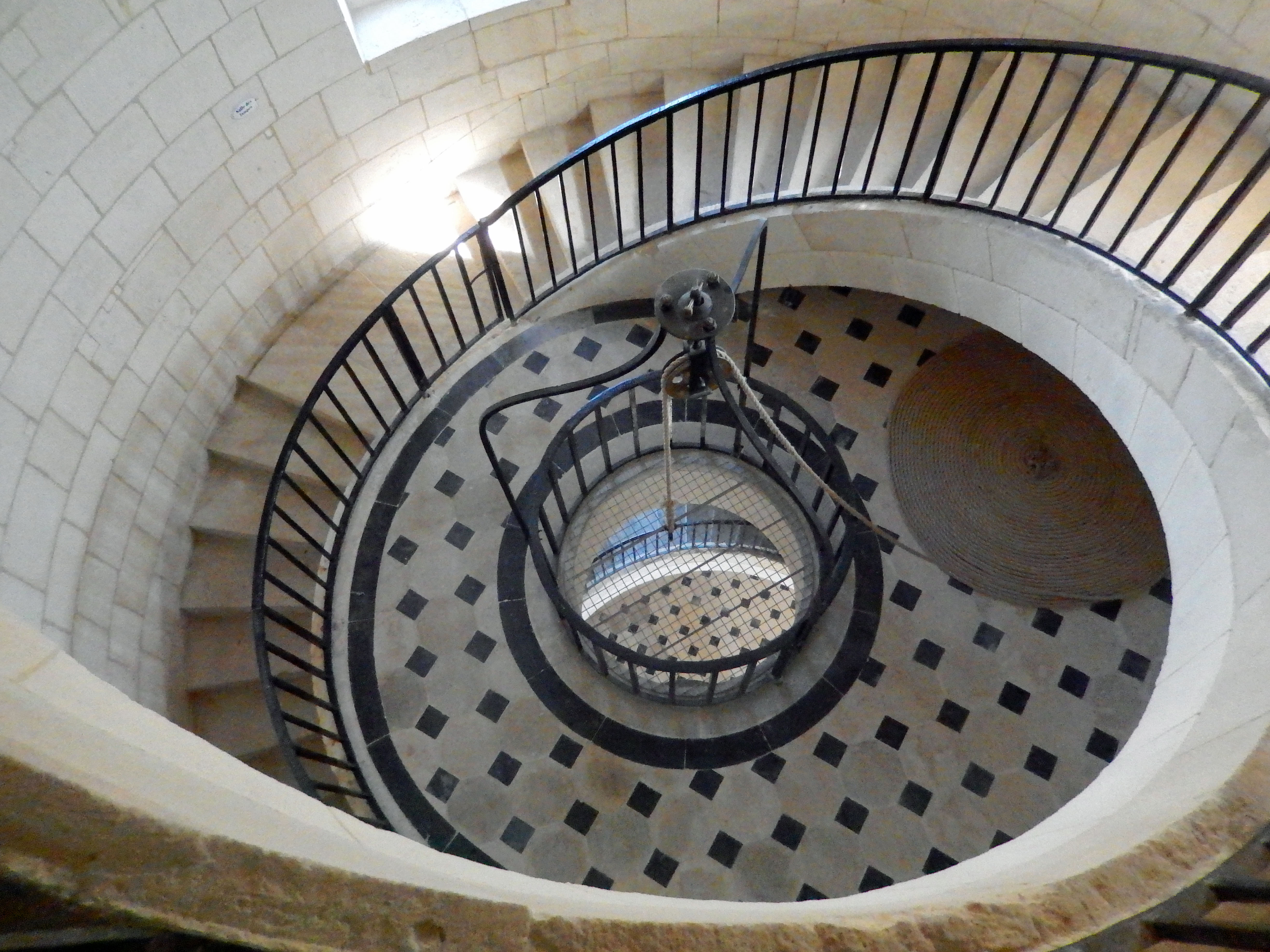 2014-09-27 Le Verdon, Gironde, phare de Cordouan, escalier